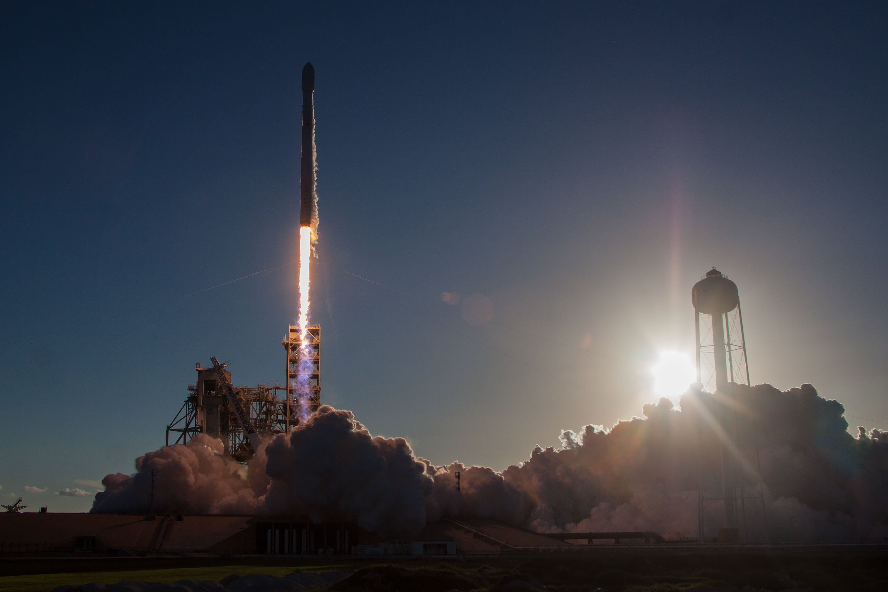 Intelsat 35e Mission